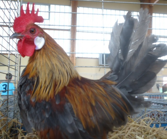 Coq jeune